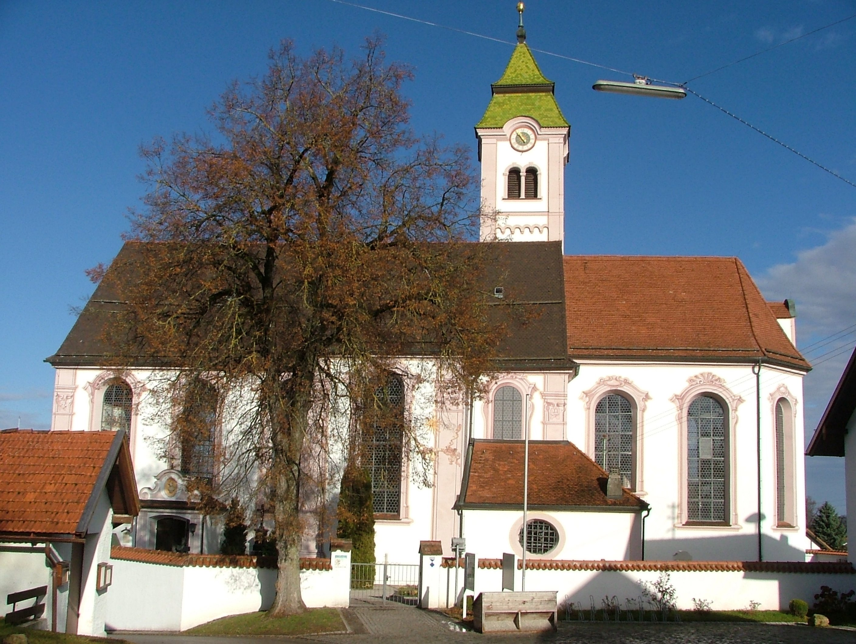 Stöttwang